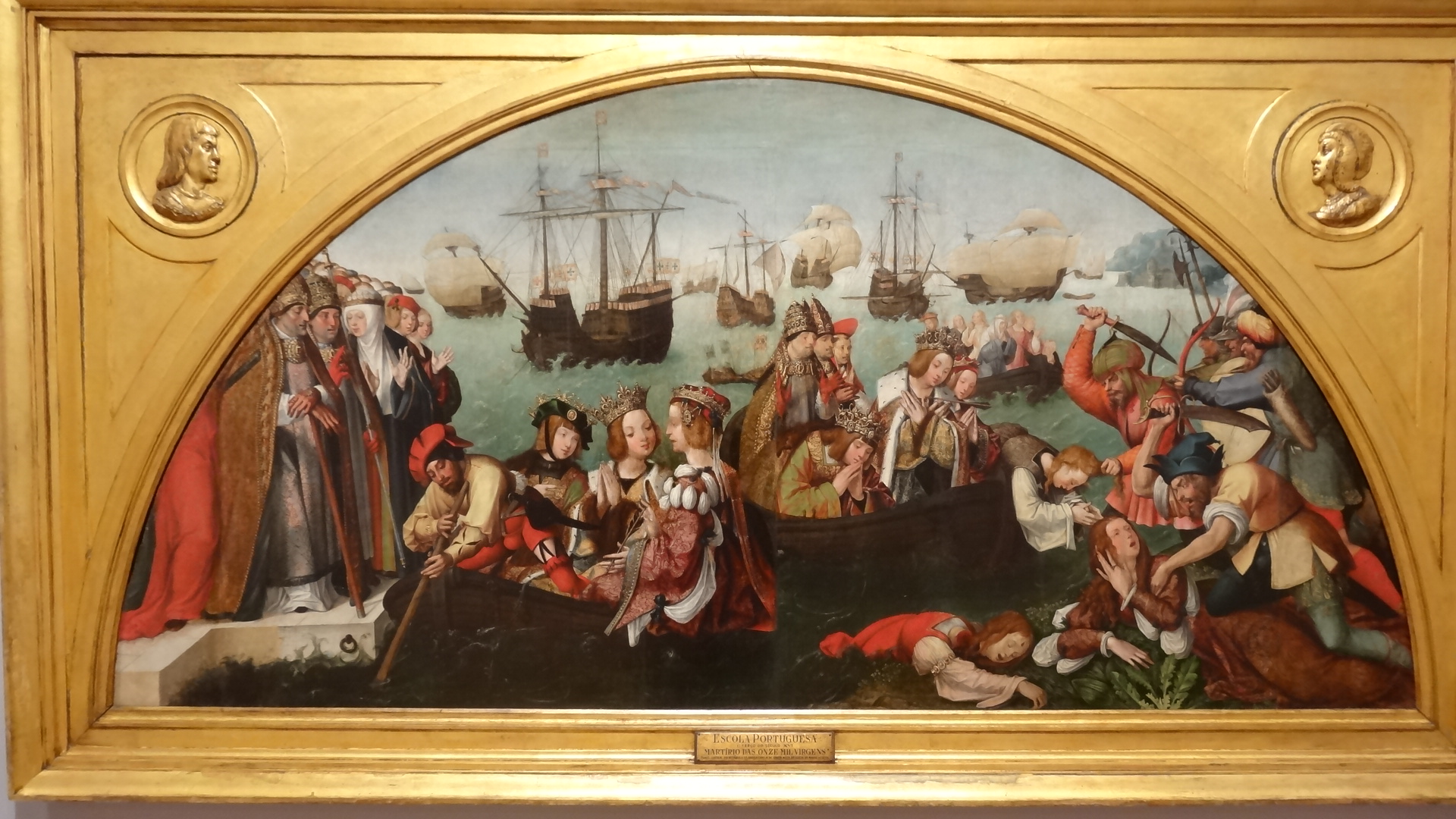 Painel central do Retábulo de Santa Auta, de cerca de 1520-25, de autor desconhecido, proveniente do Convento da Madre de Deus em Lisboa e conservado no MNAA